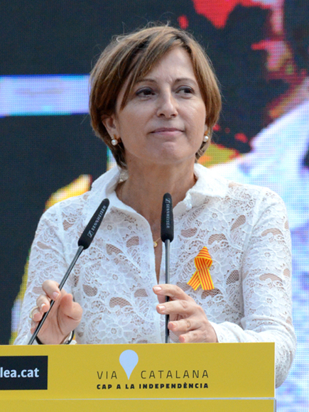 Carme Forcadell. La Via Catalana a Barcelona. Plaça Catalunya.